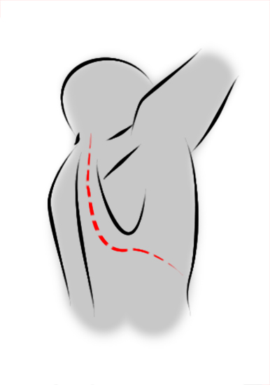 Incision cutanée d'une thoracotomie postérolatérale remontant jusqu'à la région cervicale (voie de Paulson).